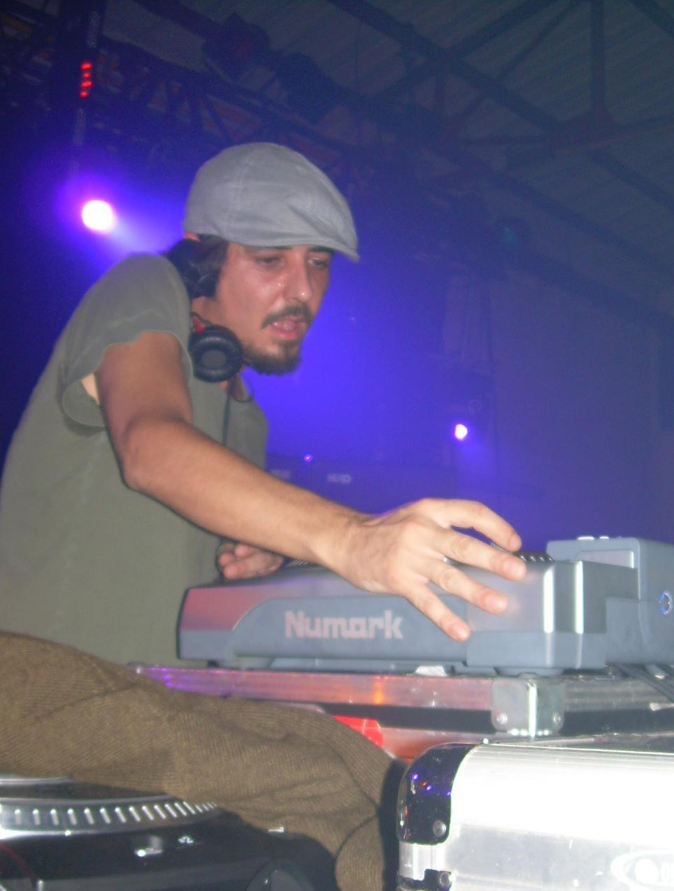 Amon Tobin Ososphère 29-09-2006.jpg Photo prise lors d'un DJ Set de Amon Tobin (anciennement Cujo) au festival Les nuits électroniques de l'Ososphère édition 2006, la nuit du 29 au 30 septembre 2006.